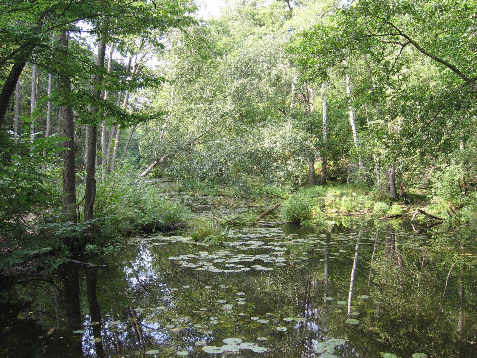 Bukówka